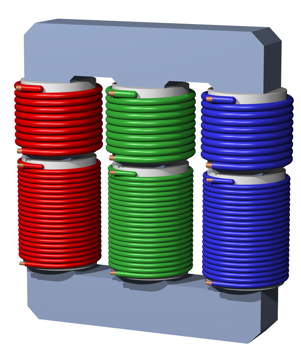 transformator för 3-fas